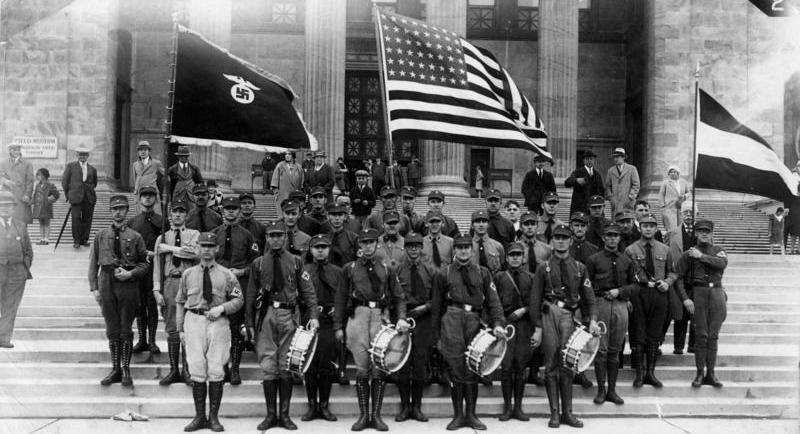 "Volksdeutscher Bilderdienst" Stuttgart Haus des Deutschtums USA/ Illinois 1931 Deutscher Tag Chicago Mai 31